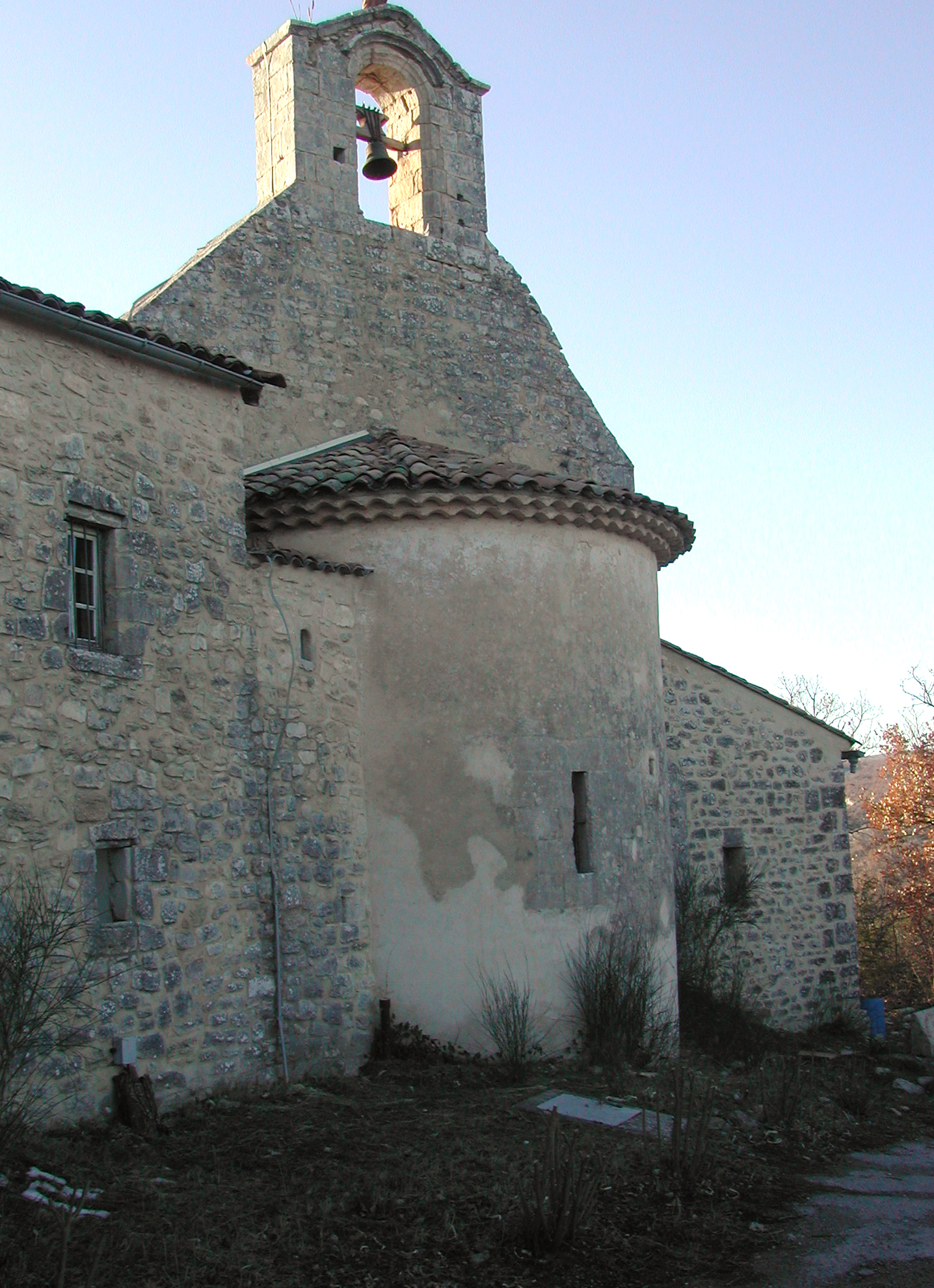 Prieuré de Chateauneuf, l'église, chevet.